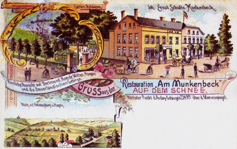 Alte Postkarte aus Herdecke, Restauration Munkenbeck (Ausflugsgaststätte) neben der Gaststätte Becker, Auf dem Schnee